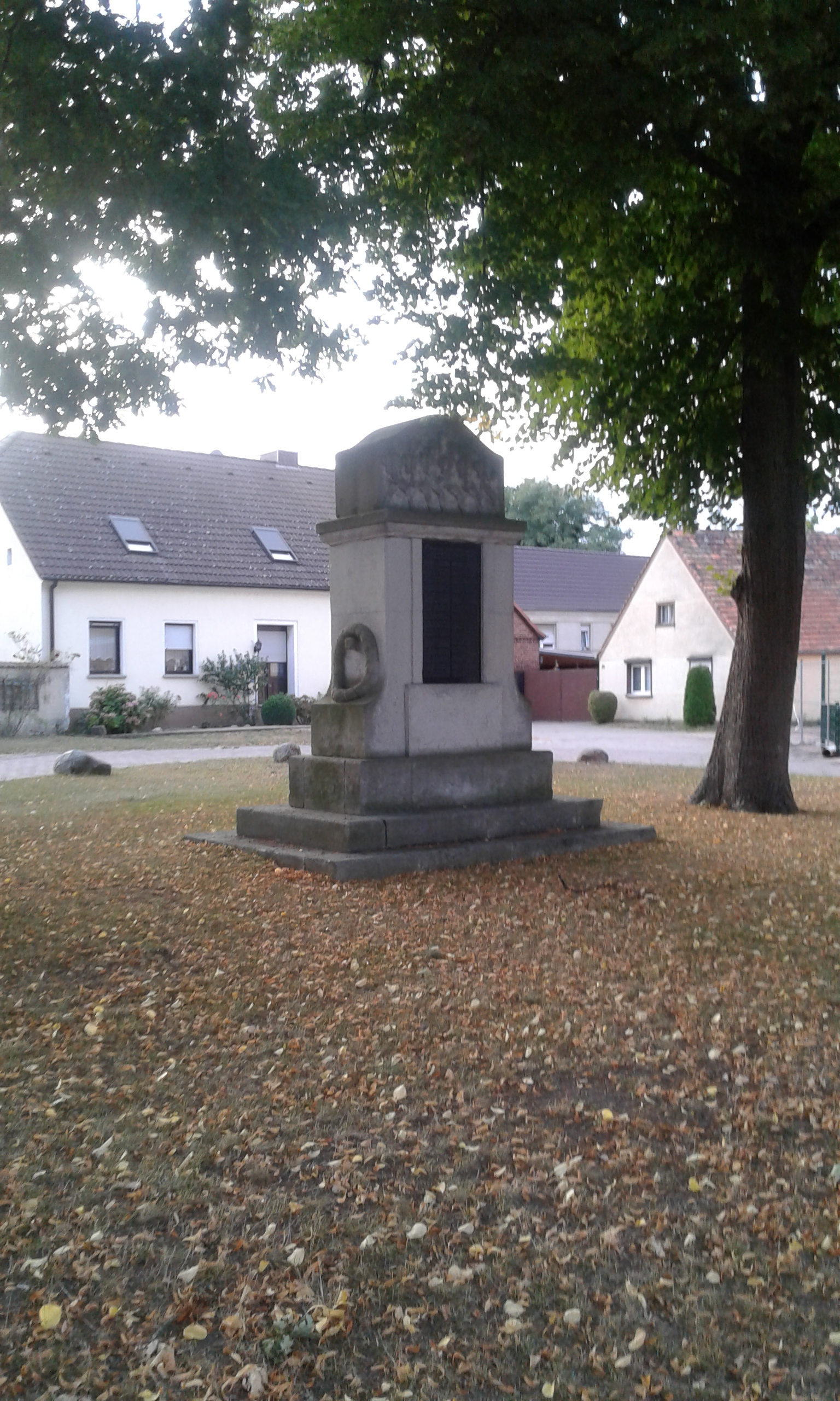 Kriegerdenkmal